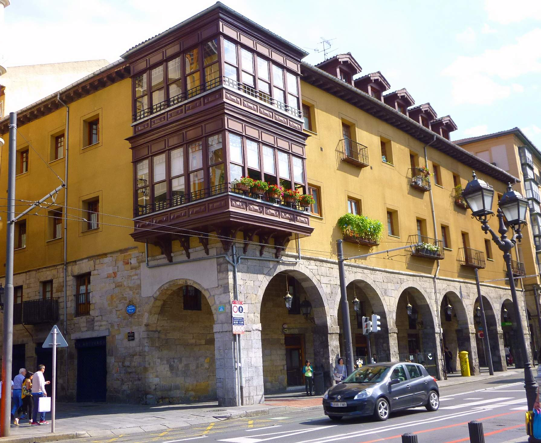 Bilbao - Palacio Arana